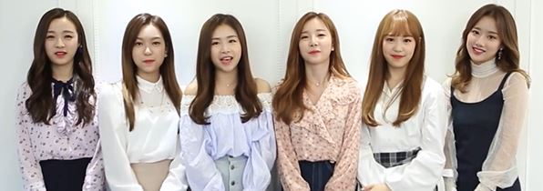 [TV텐] 에이프릴(April) 인터뷰 메이킹 영상